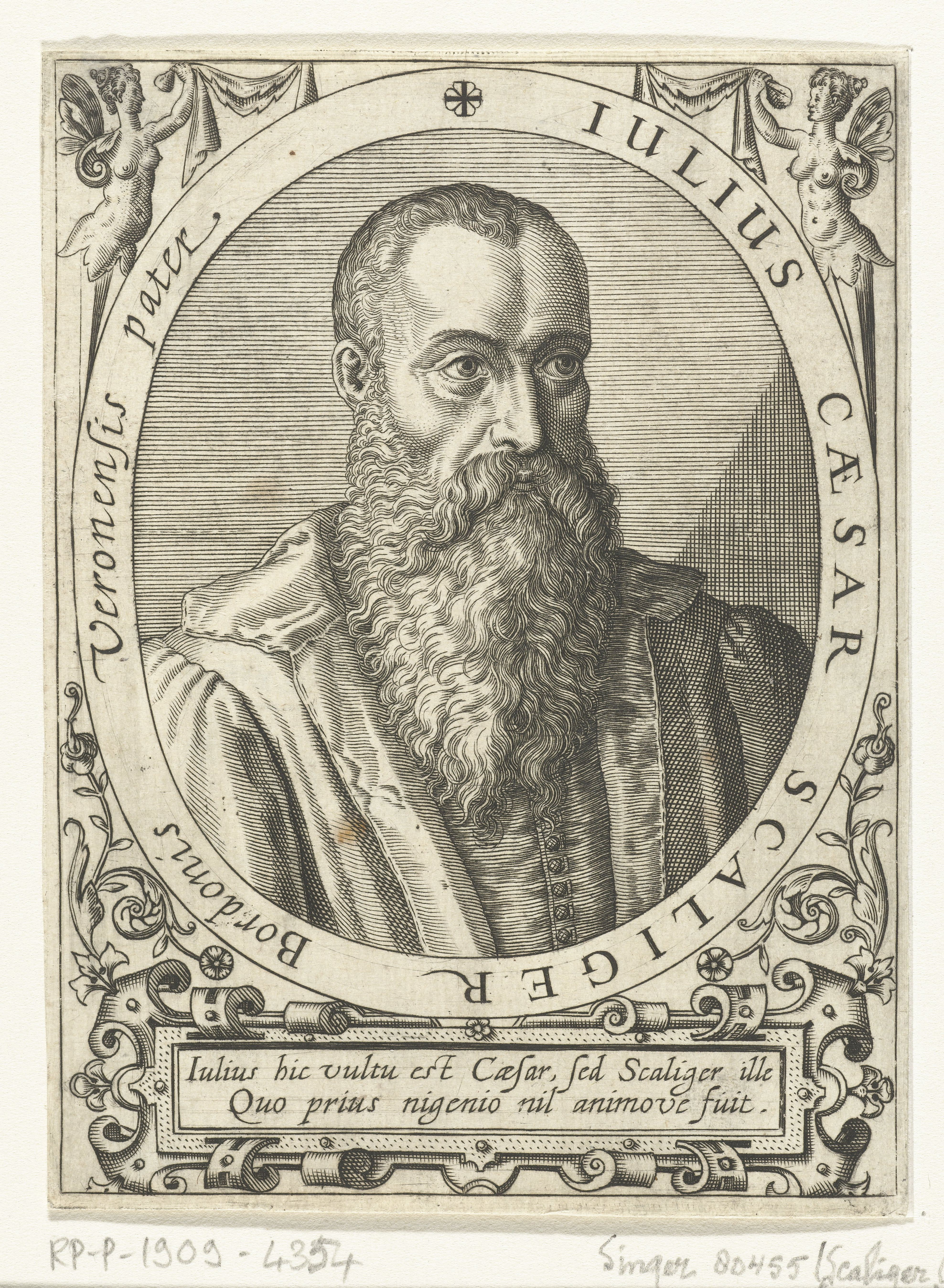 IdentificatieTitel(s): Portret van Julius Caesar ScaligerIulius Caesar Scaliger (titel op object)Objecttype: prent boekillustratie Objectnummer: RP-P-1909-4354Catalogusreferentie: Singer 80455Opschriften / Merken: verzamelaarsmerk, verso, gestempeld: Lugt 2228Omschrijving: Portret van de arts Julius Caesar Scaliger, in ovaal met randschrift. Onder het portret een lofdicht.VervaardigingVervaardiger: prentmaker: Johann Theodor de Brynaar tekening van: Jean Jacques Boissard (mogelijk)Plaats vervaardiging: Frankfurt am MainDatering: ca. 1597 - ca. 1599Fysieke kenmerken: gravureMateriaal: papier Techniek: graveren (drukprocedé)Afmetingen: plaatrand: h 140 mm × b 100 mmToelichtingGemaakt voor: J.J. Boissard, Icones virorum illustrium doctrina &c eruditione praestanti um contines. Frankfurt am Main: de Bry, 1597-1599.OnderwerpWie: Julius Caesar ScaligerVerwerving en rechtenVerwerving: aankoop 1905Copyright: Publiek domein